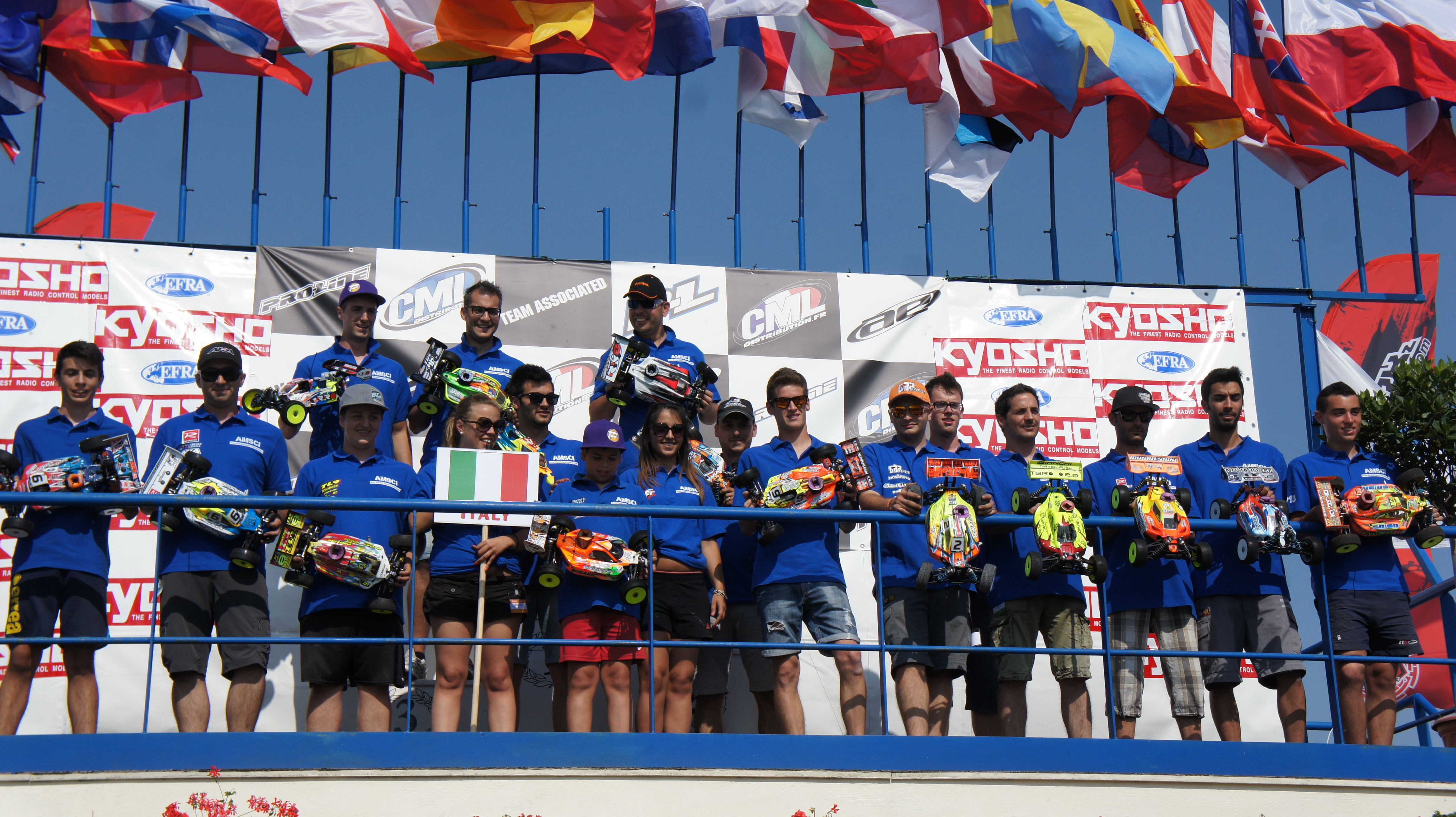 Lors du Championnat d'Europe EFRA 2013 à Reims.